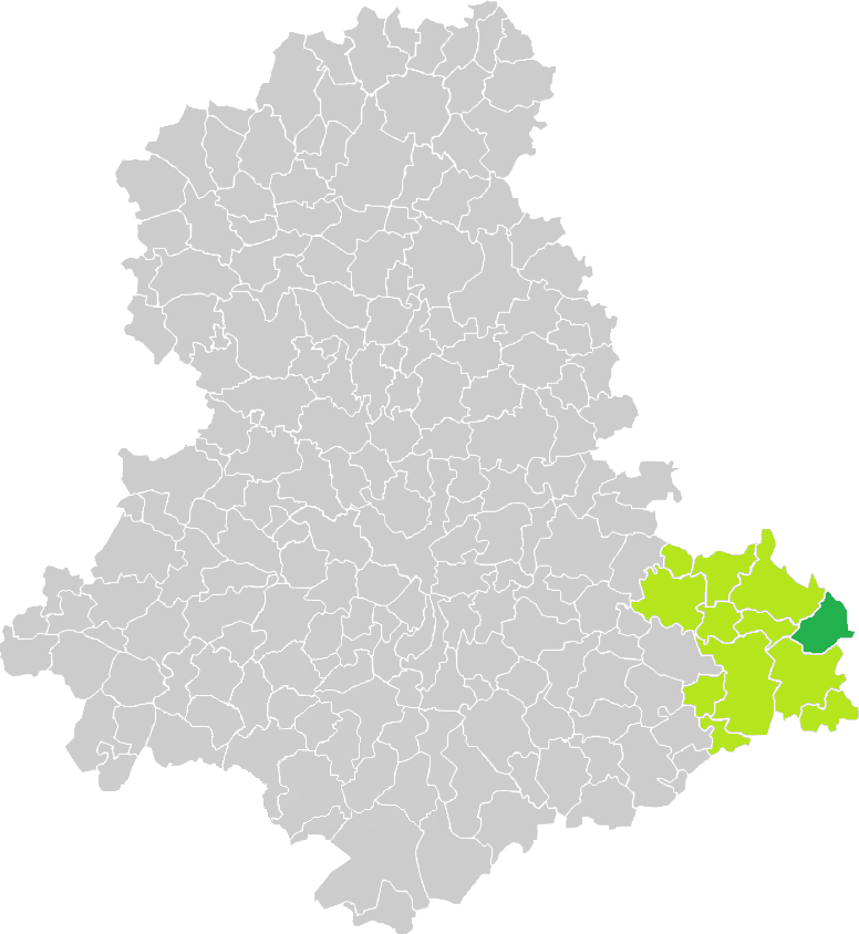 Carte de situation de la commune de Beaumont-du-Lac (en vert foncé) dans le votre Canton (en vert clair) sur une carte des communes de la Haute-Vienne